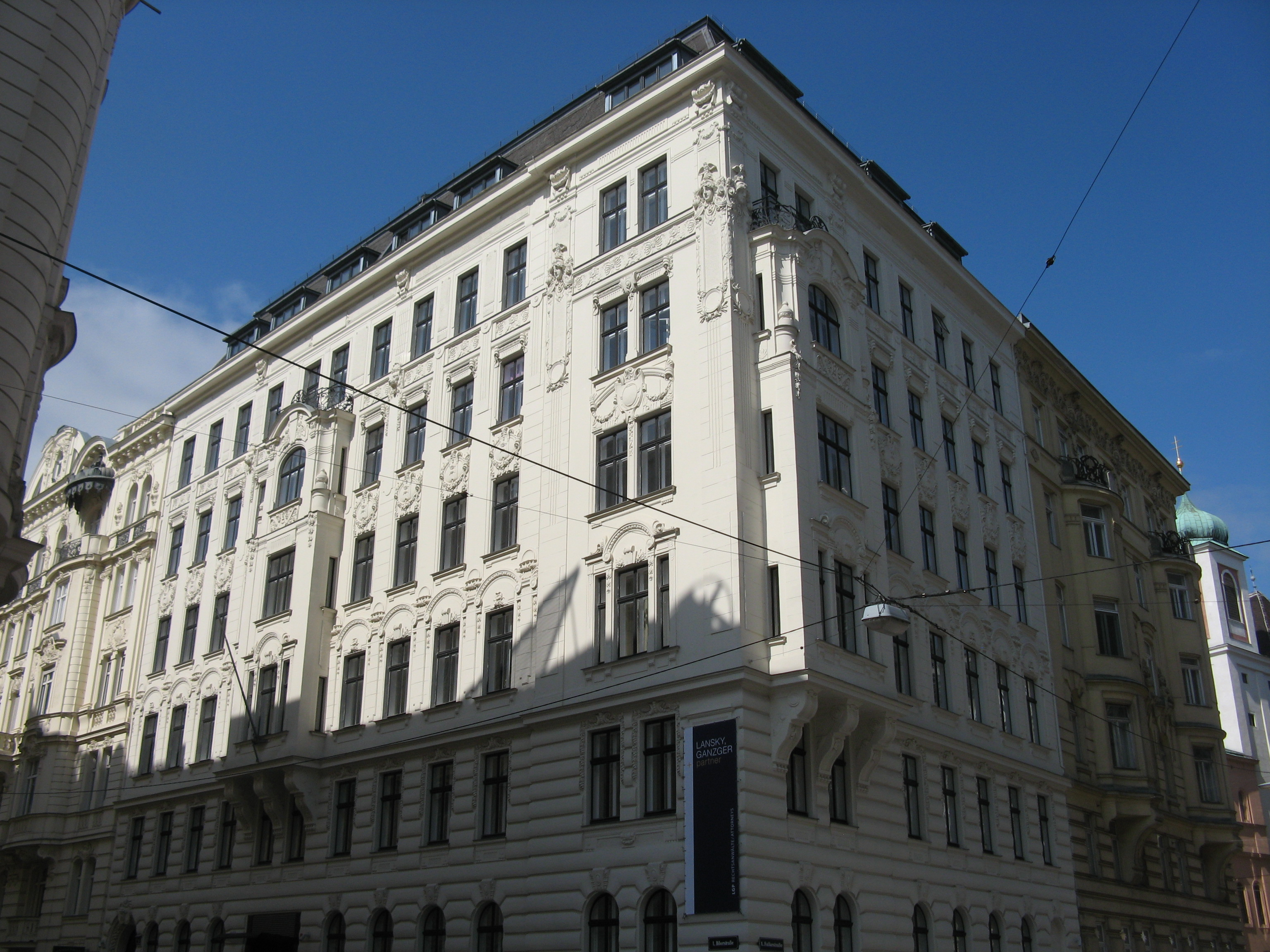 Haus Biberstraße Nr. 5 von Ludwig Schöne (1901-1902), Wien-Innere Stadt